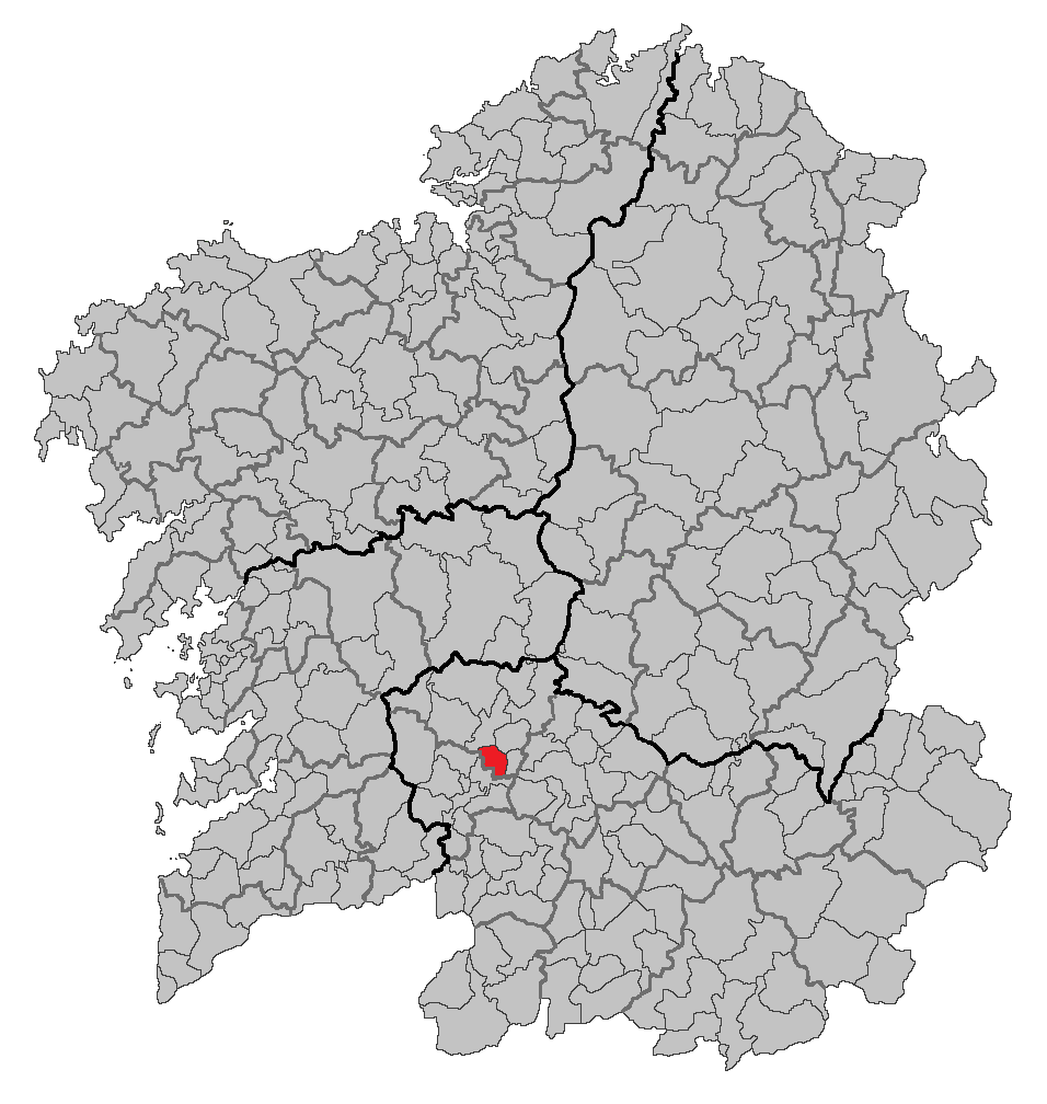 Mapa coa localización do concello de San Amaro.